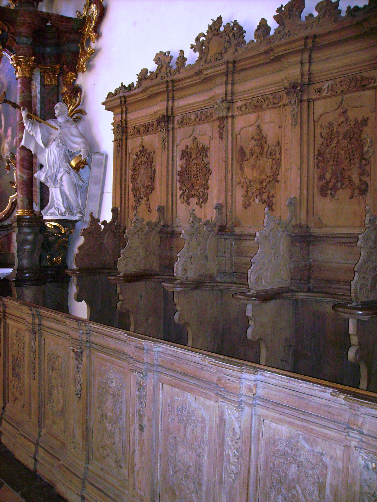 Das Kloster Tückelhausen ist ein ehemaliges Kloster der Kartäuser in Ochsenfurt in Bayern. Chorgestühl.